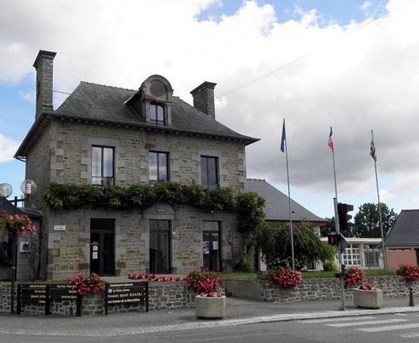 Mairie de Baguer-Pican (35).